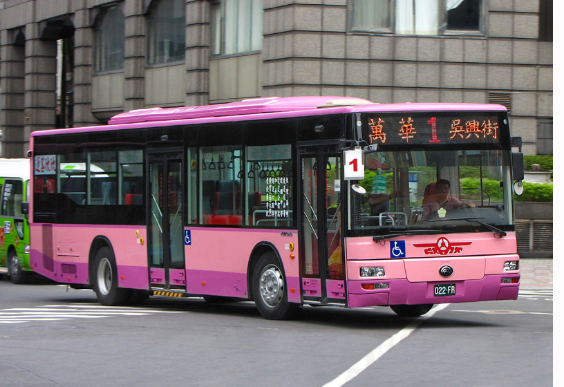 欣欣客運宇通低底盤大客車022-FR右前方外觀。